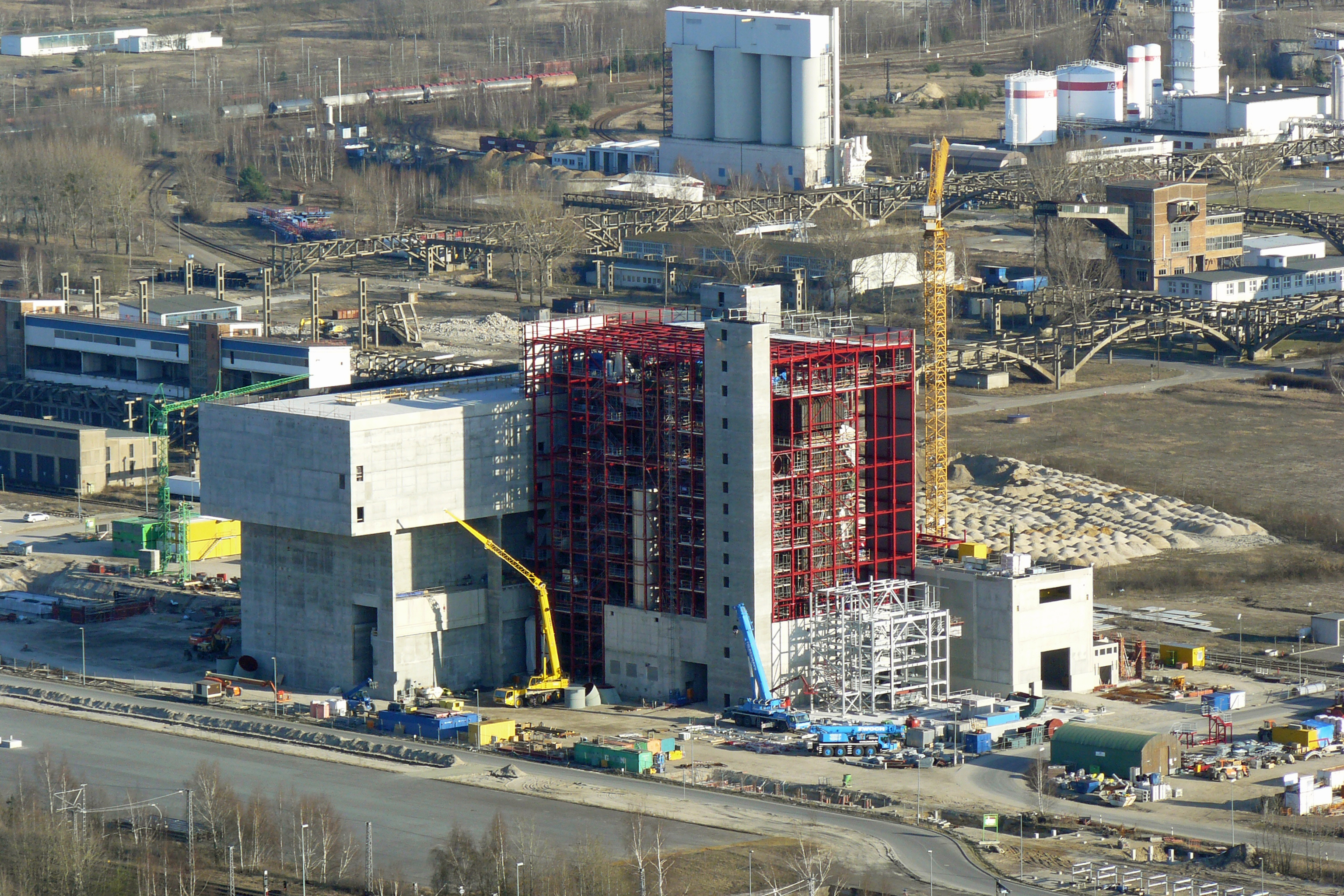 Ersatzbrennstoff-Kraftwerk der Papierfabrik Hamburger-Rieger GmbH & Co. KG im Industriepark Schwarze Pumpe im März 2012